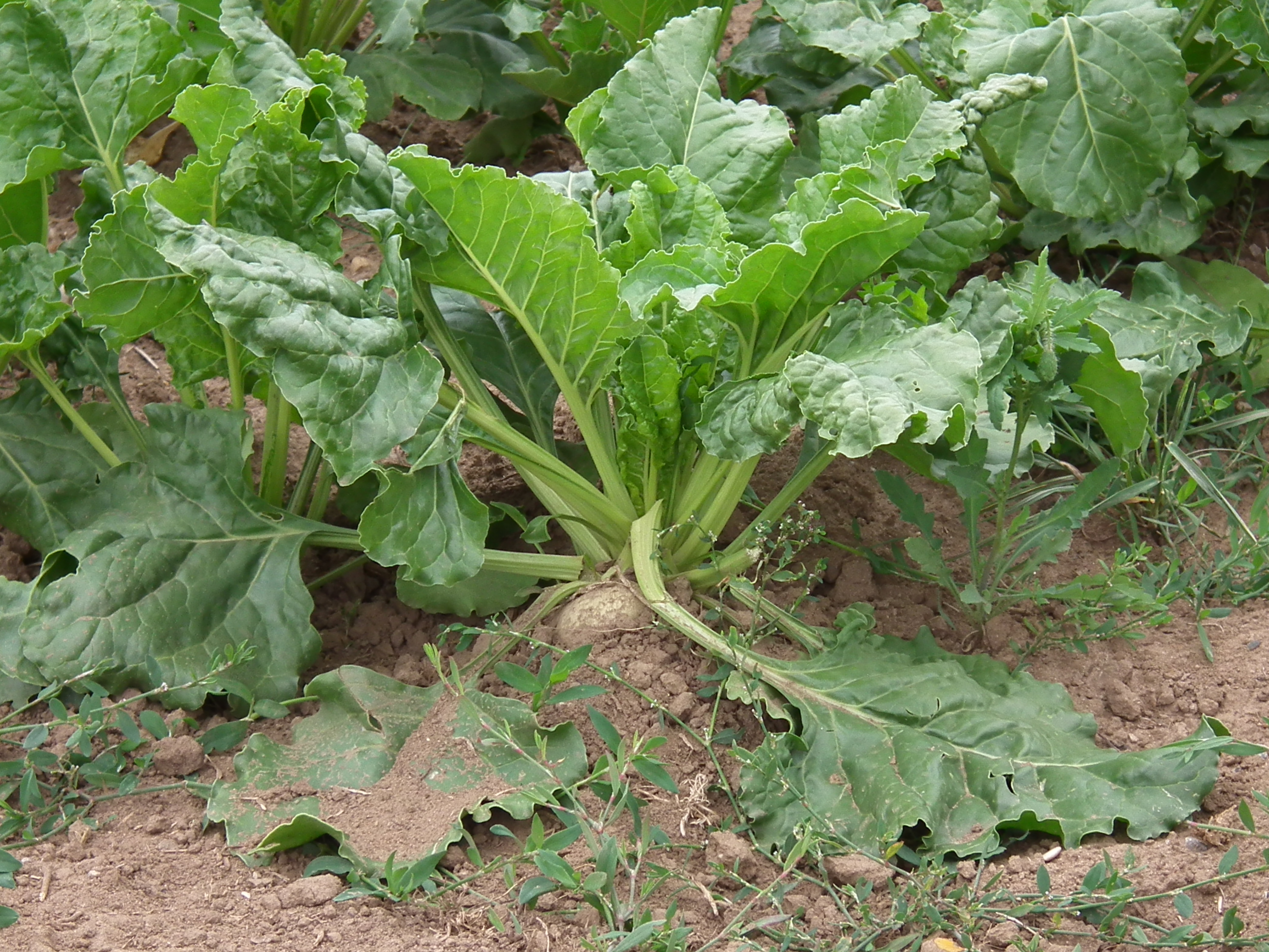 Zuckerrübe (Beta vulgaris), fotogafiert in Heidelberg (Baden-Württemberg, Deutschland)